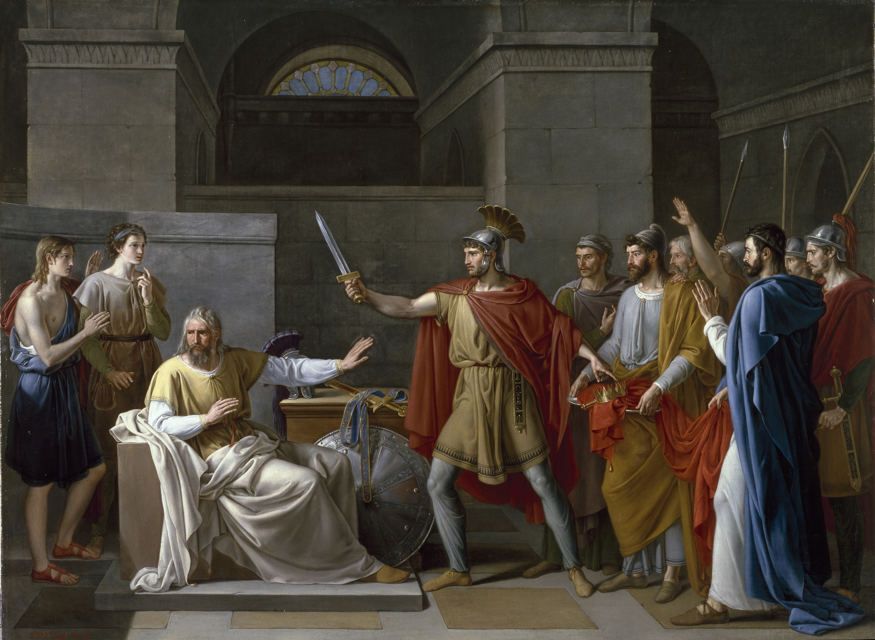 La obra representa el momento en que el rey visigodo Wamba (600-688) fue obligado a renunciar a la corona.